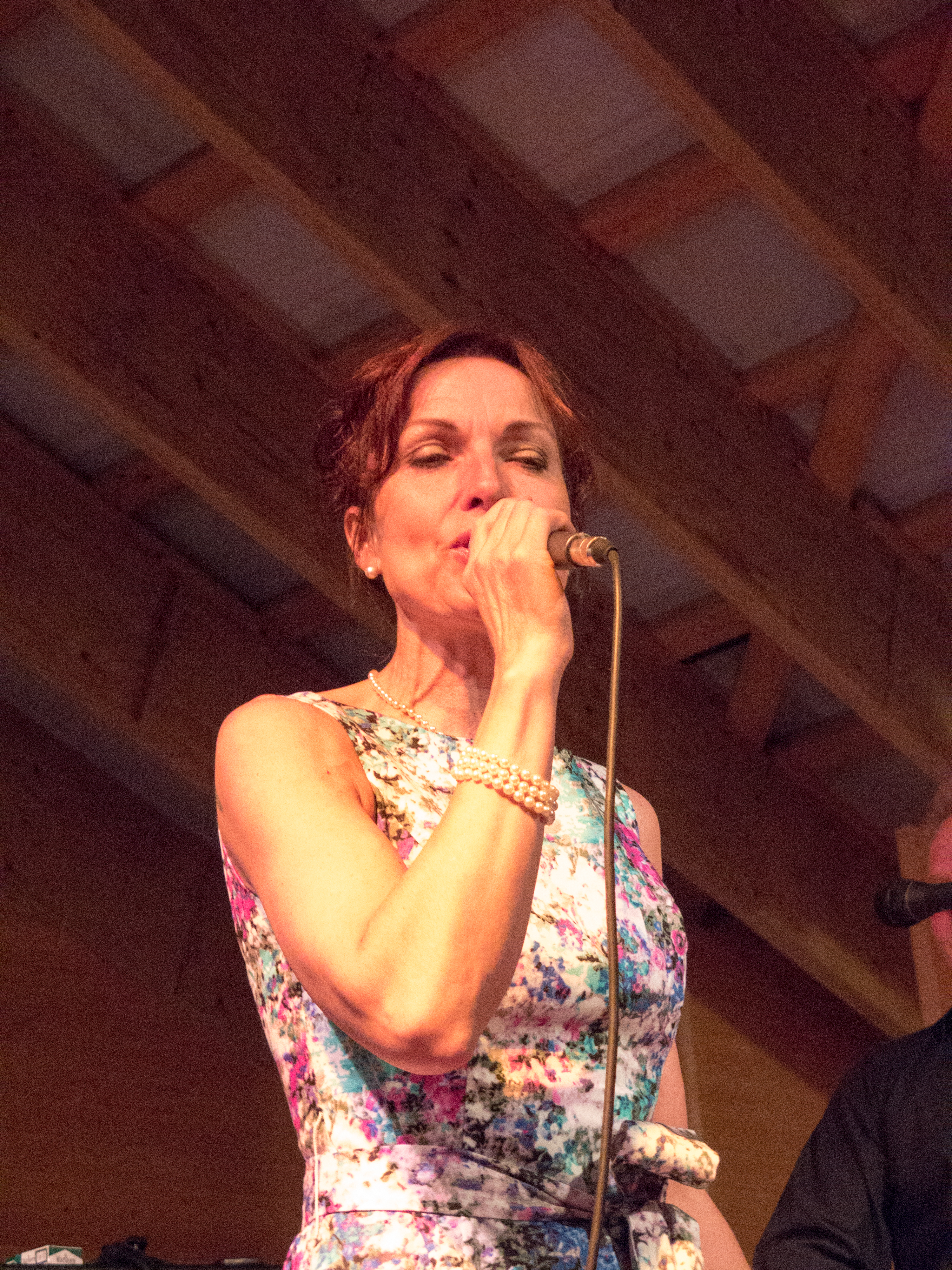 Maarit peltoniemi suomalainen laulaja